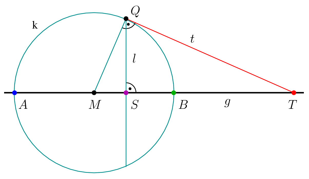 Konstruktion des 4. harmonischen Punktes: mit Kreis